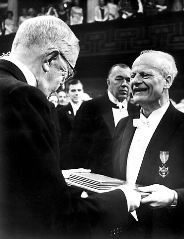 Hans Bethe mottar 1967 nobelpriset i fysik ur kung Gustaf VI Adolfs hand.